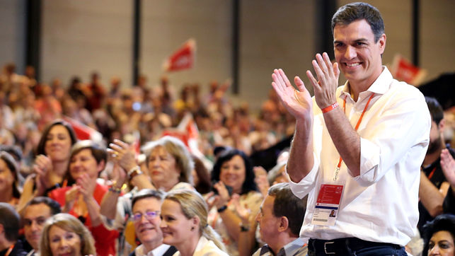 Pedro Sánchez accompagné des militants du PSOE lors du 39e congrès fédéral de la formation en juin 2017.